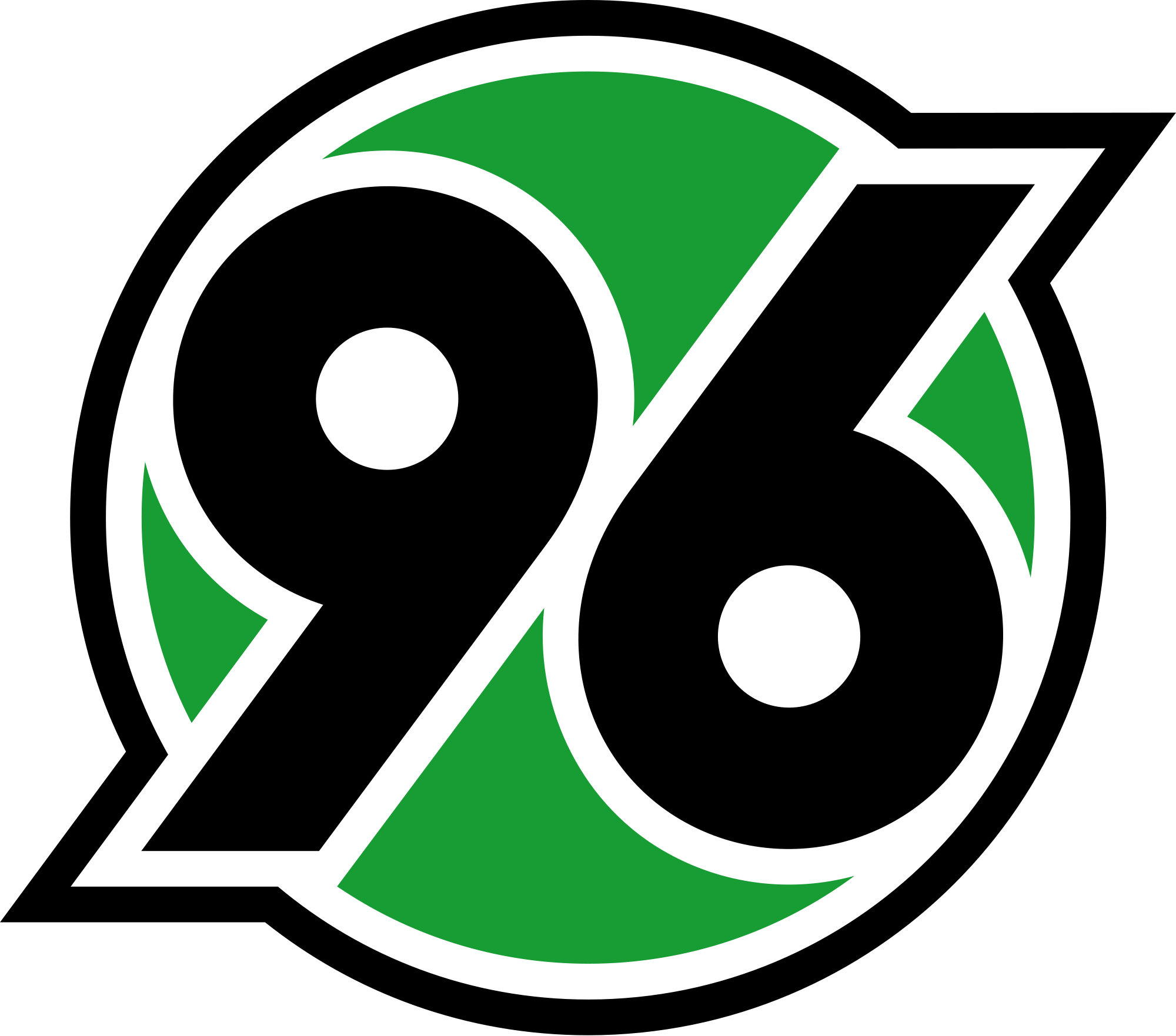 Vereinslogo des Hannover_96